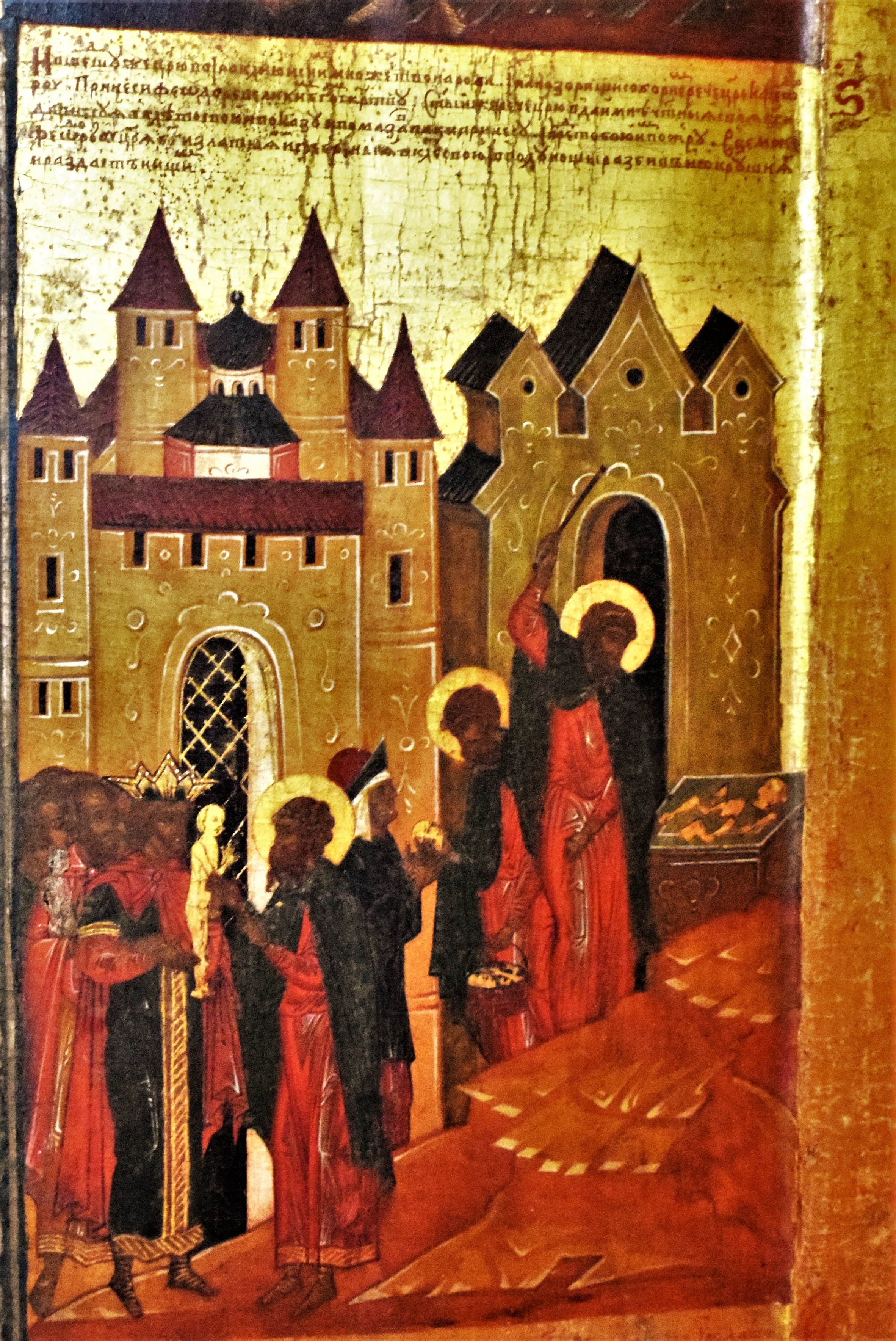 Rieterkirche St. Marien und Christophorus in Kalbensteinberg, Vitenikone des Theodor Stratelates (um 1573) (Detail), 6. Randbild: Kaiser Licinius hat goldene und silberne heidnische Götterstatuen mitgebracht, die Theodor verehren soll. Auf diesem Bild sind 3 aufeinander folgende Szenen dargestellt. Links nimmt Theodor die vom Kaiser mitgebrachten Statuen entgegen unter dem Vorwand, sie zuhause salben zu wollen. Rechts sieht man, wie er sie zerschlägt, und in der Mitte, wie er die Bruchstücke an die Armen verteilt.